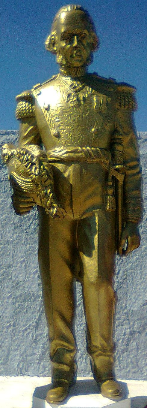 Monumento al General Jose Maria Yañez en el panteon "Heroes Civiles" de Guaymas Sonora